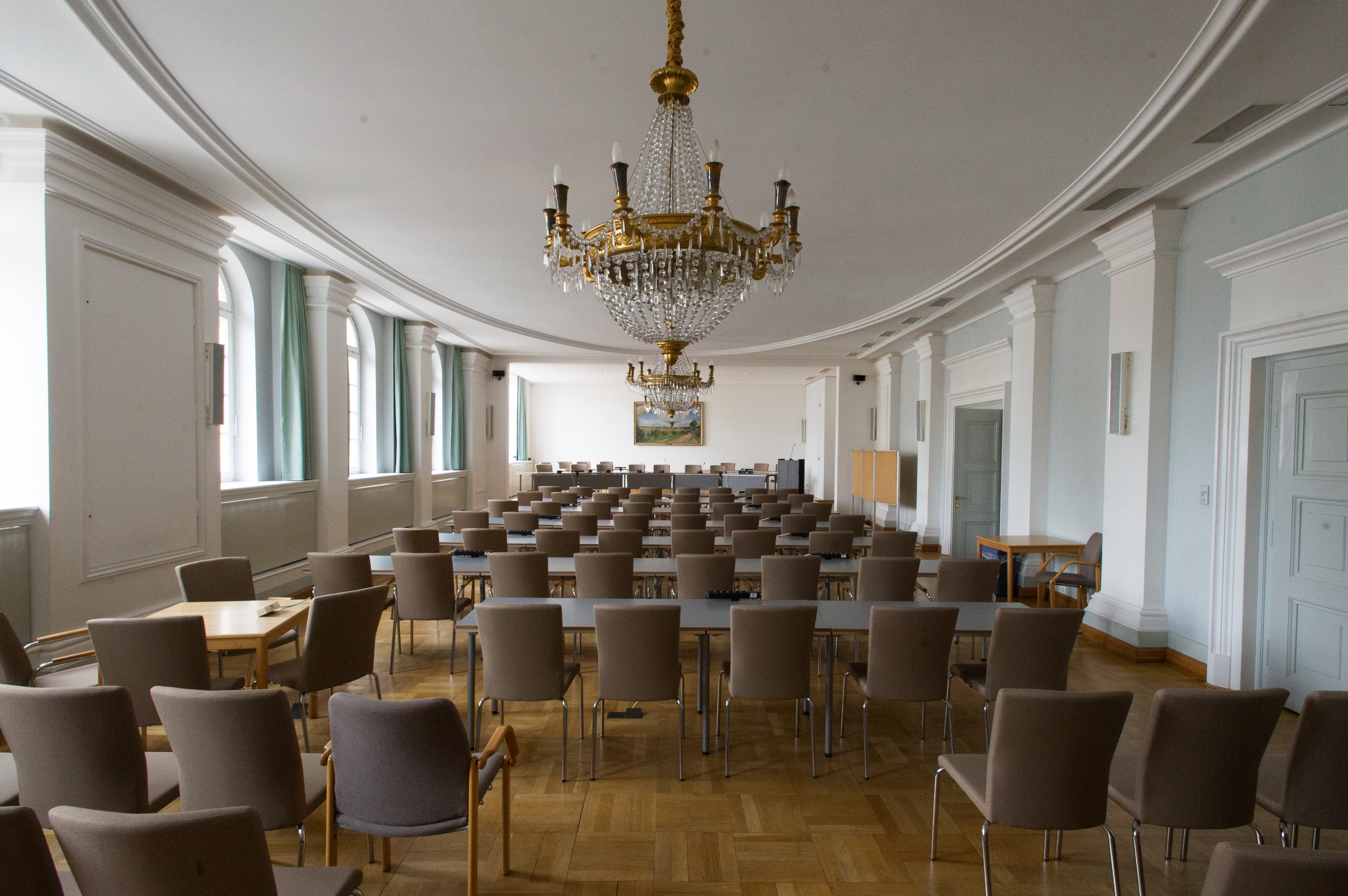 Demmlersaal des Schweriner Rathauses, genutzt für Stadtvertretersitzungen Wikipedia im Landtag – Mecklenburg-Vorpommern 19. bis 21. Juni 2013 in Schwerin Fragen zur Nachnutzung Wenn Sie Fragen zur Nachnutzung dieses Bildes haben, können Sie sich jederzeit gern an wenden Personality rights warning Although this work is freely licensed or in the public domain, the person(s) shown may have rights that legally restrict certain re-uses unless those depicted consent to such uses. In these cases, a model release or other evidence of consent could protect you from infringement claims.